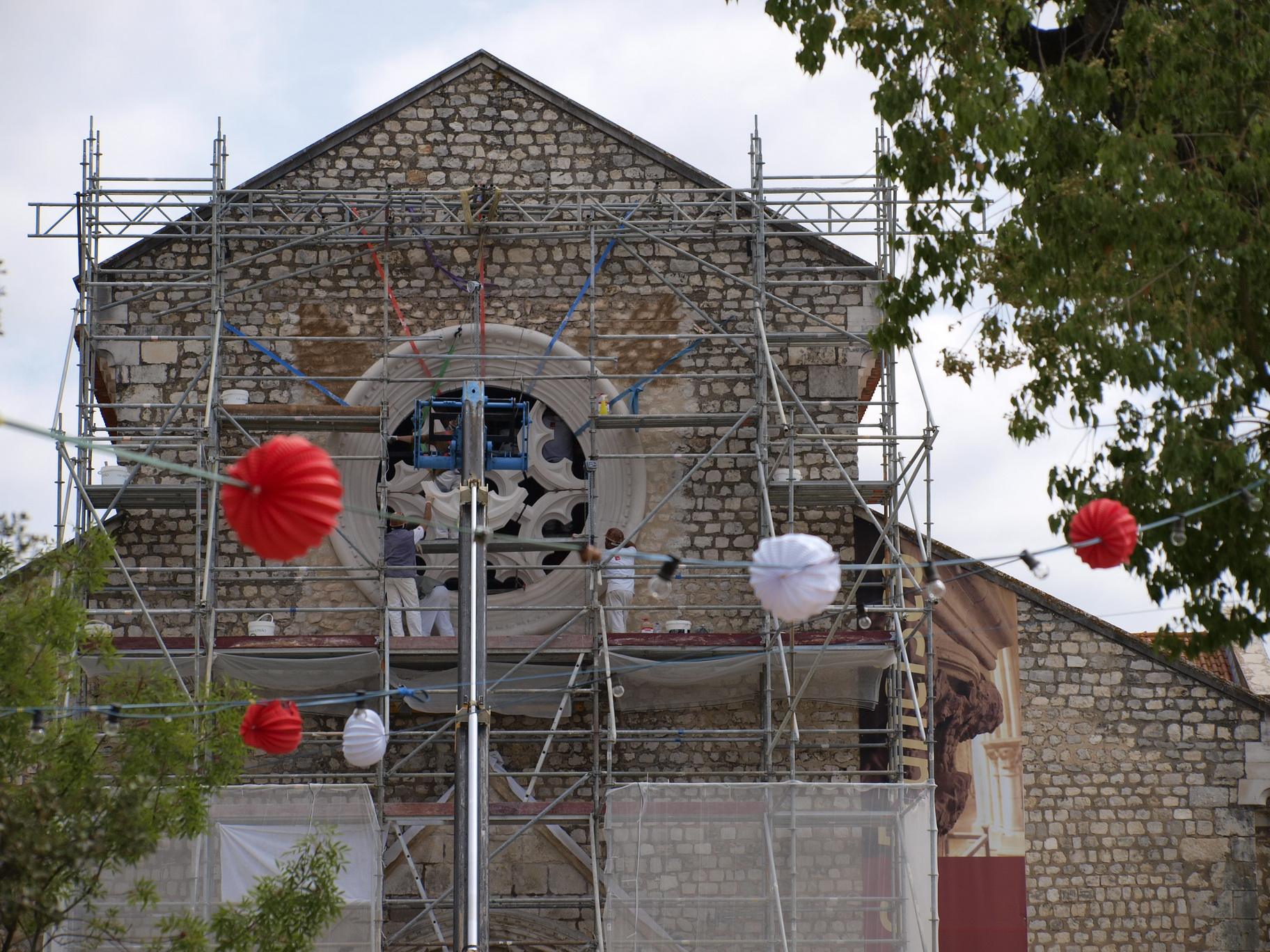 Colocação da Rosácea esculpida pela mestre de cantaria artística, Cristina Maria Ferreira.